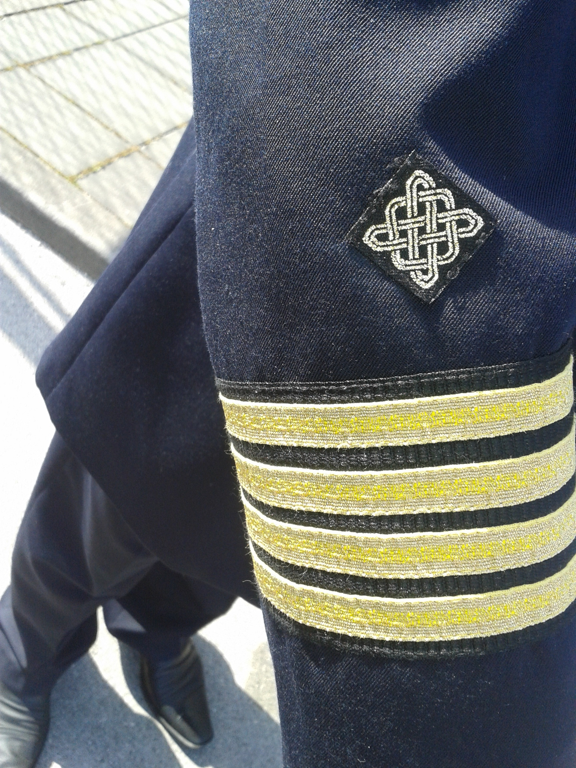 Oznaka čina kapetana bojnog broda na rukavu odore